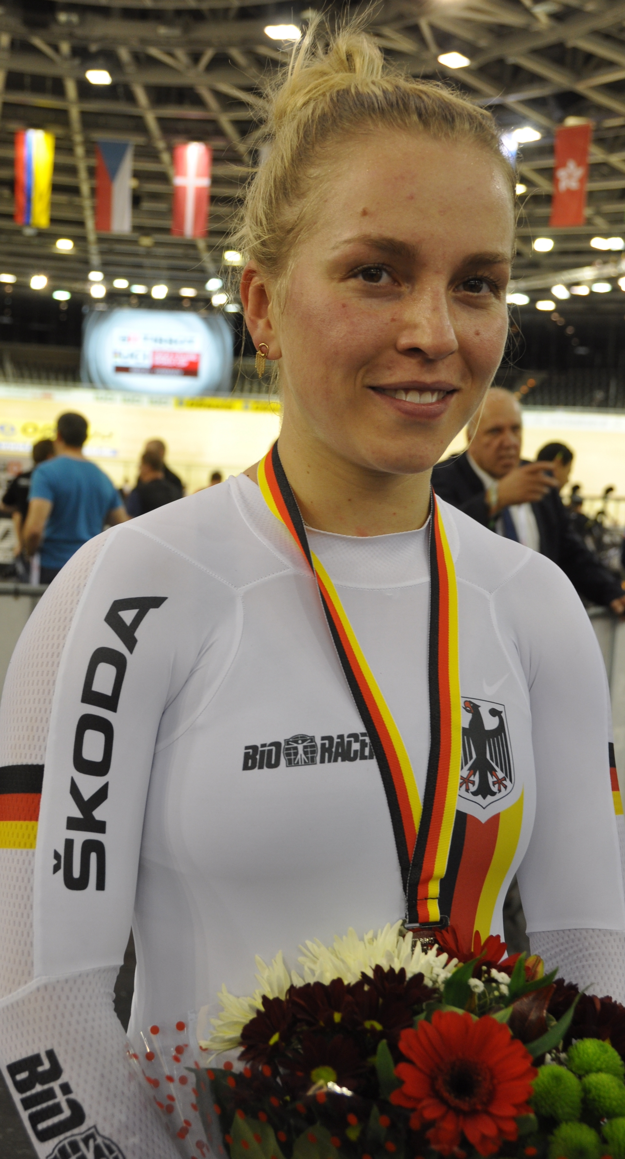 Emma Hinze, deutsche Radsportlerin - Silber im Keirin